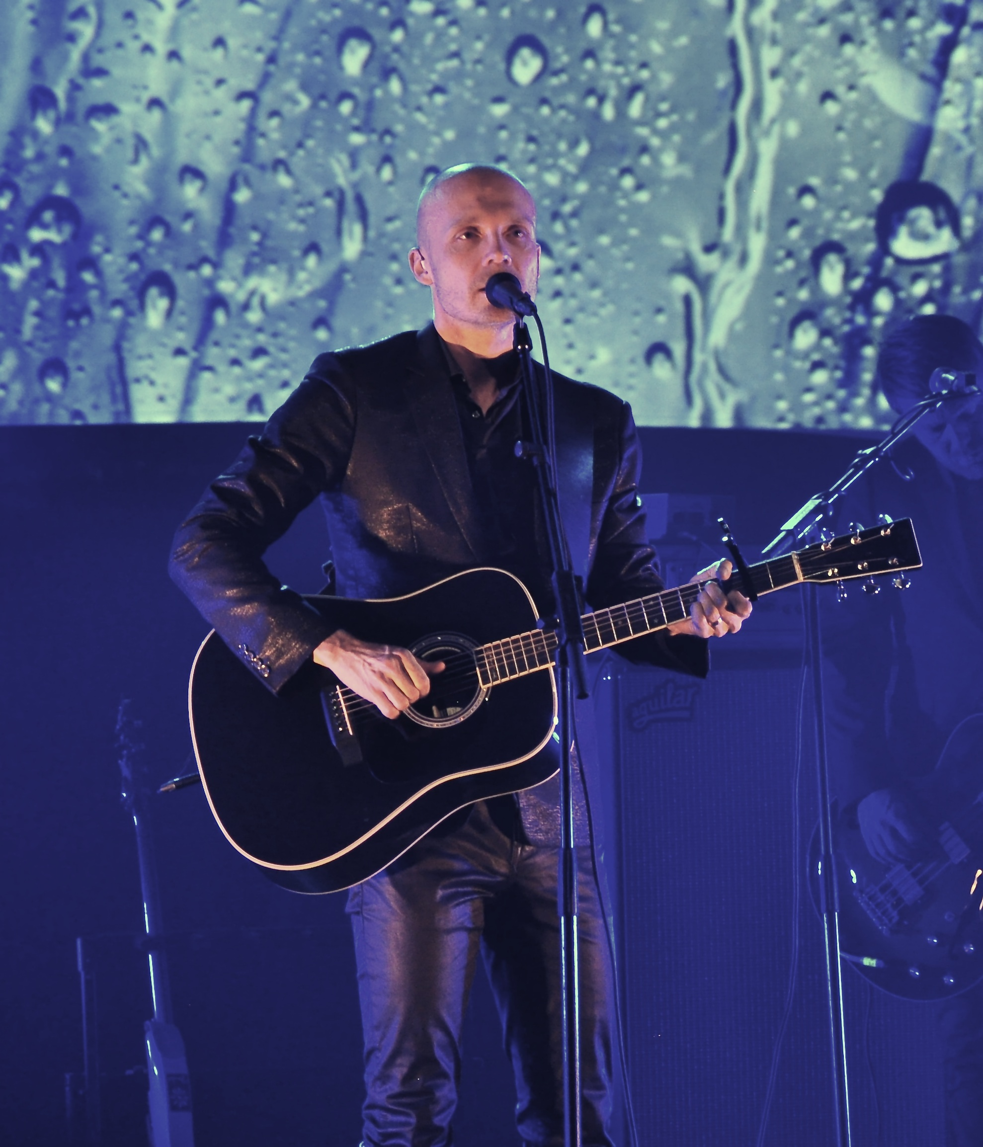 Juha Tapio Kuopiossa marraskuussa 2013.